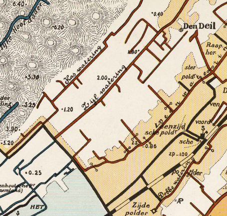 Veenzijdse_Polder